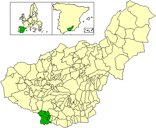 Mapa del partido judicial de Almuñécar, en la provincia de Granada (España)